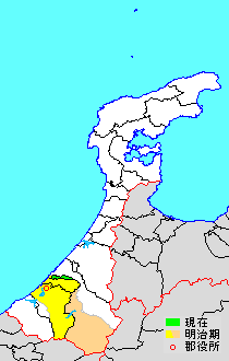 Ishikawa Nomi-gun